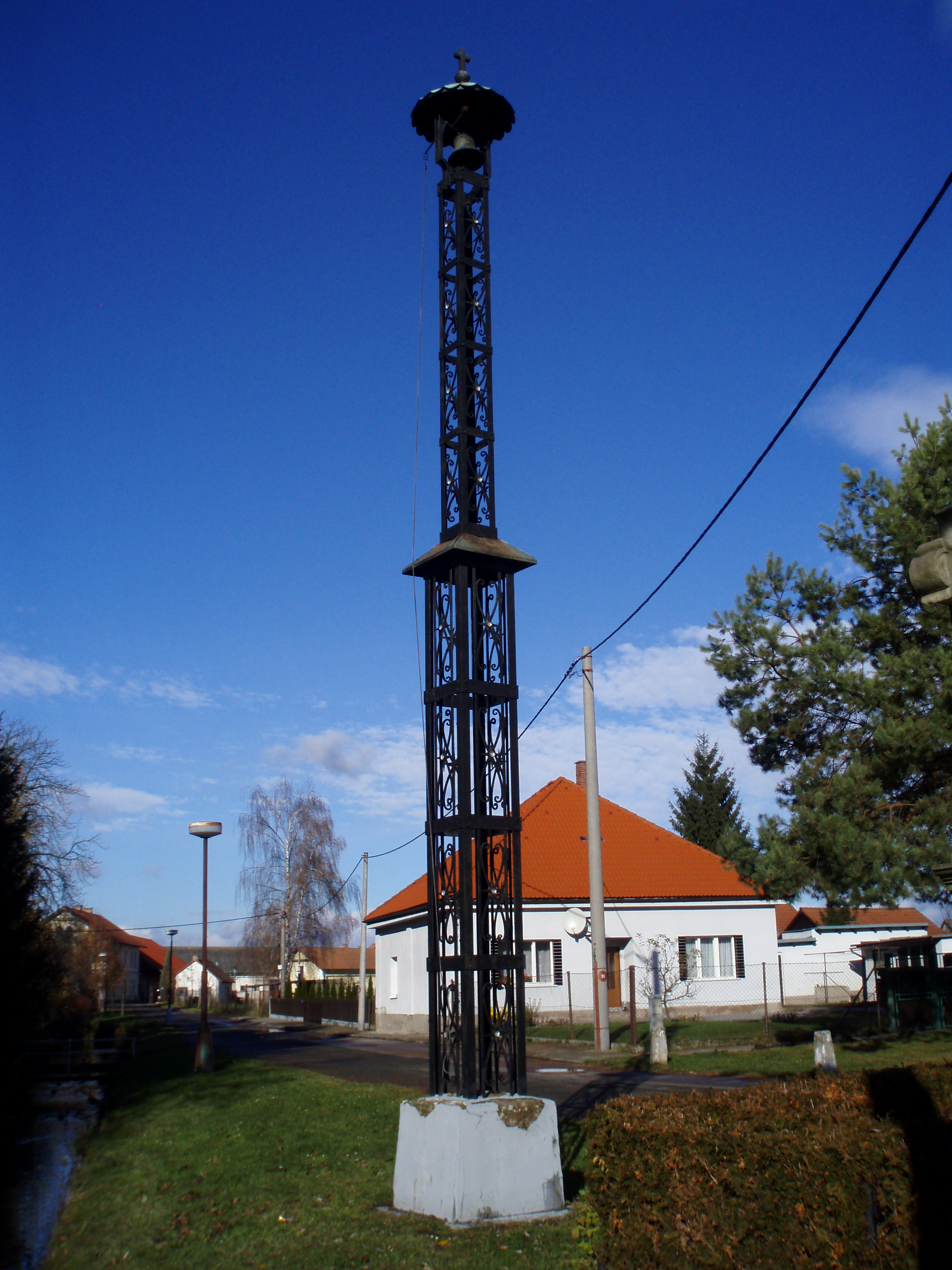 Zvonička v Plačicích